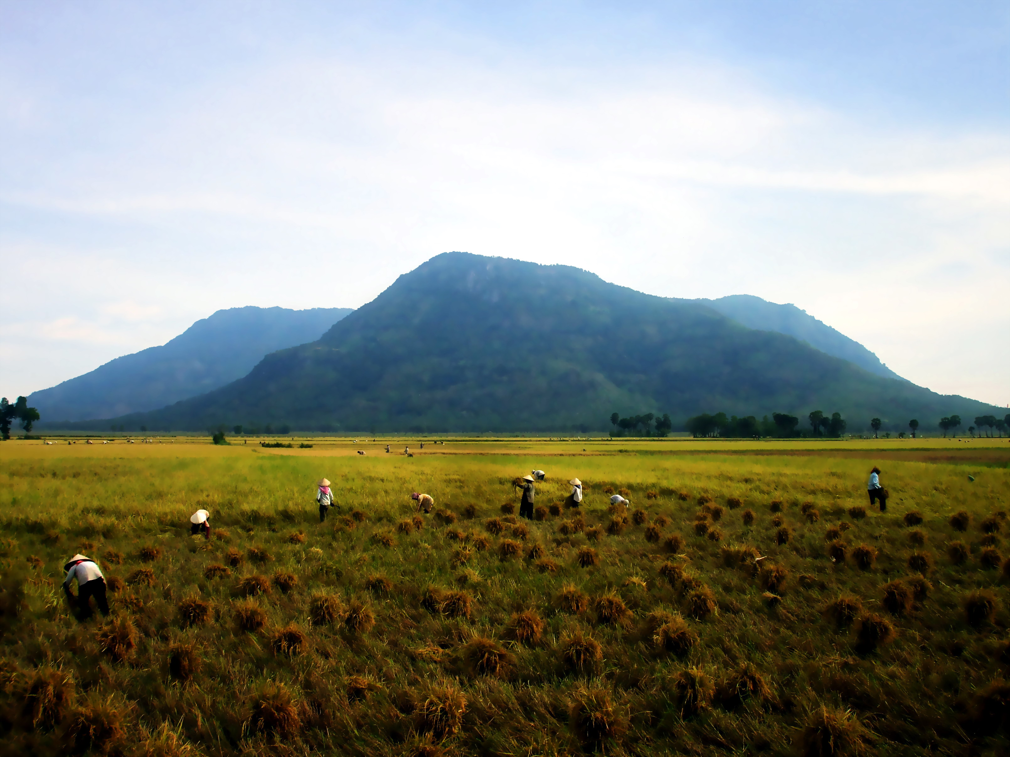 Một cánh đồng lúa chín ở An Giang, Việt Nam.